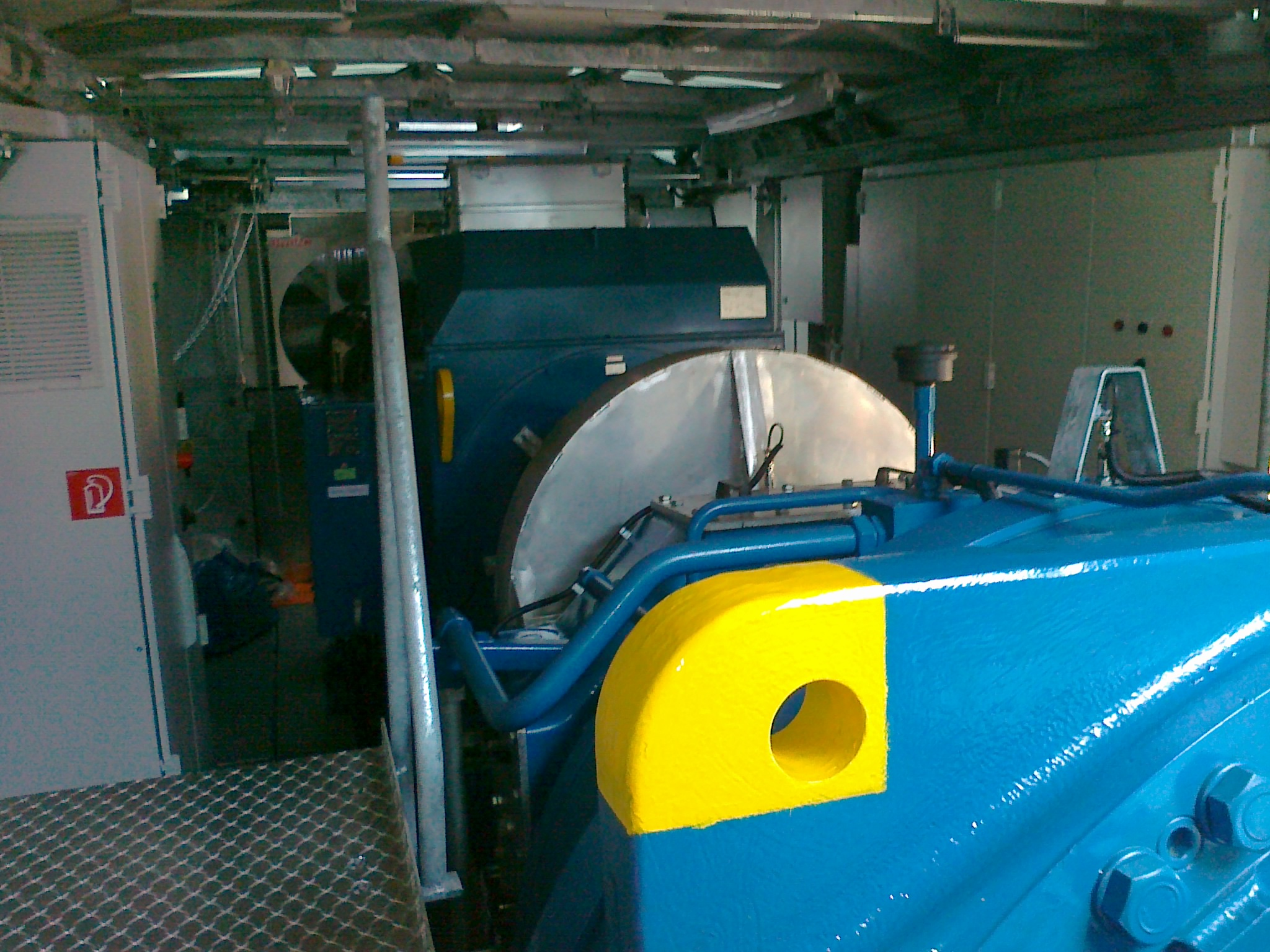 இயந்திரம்.